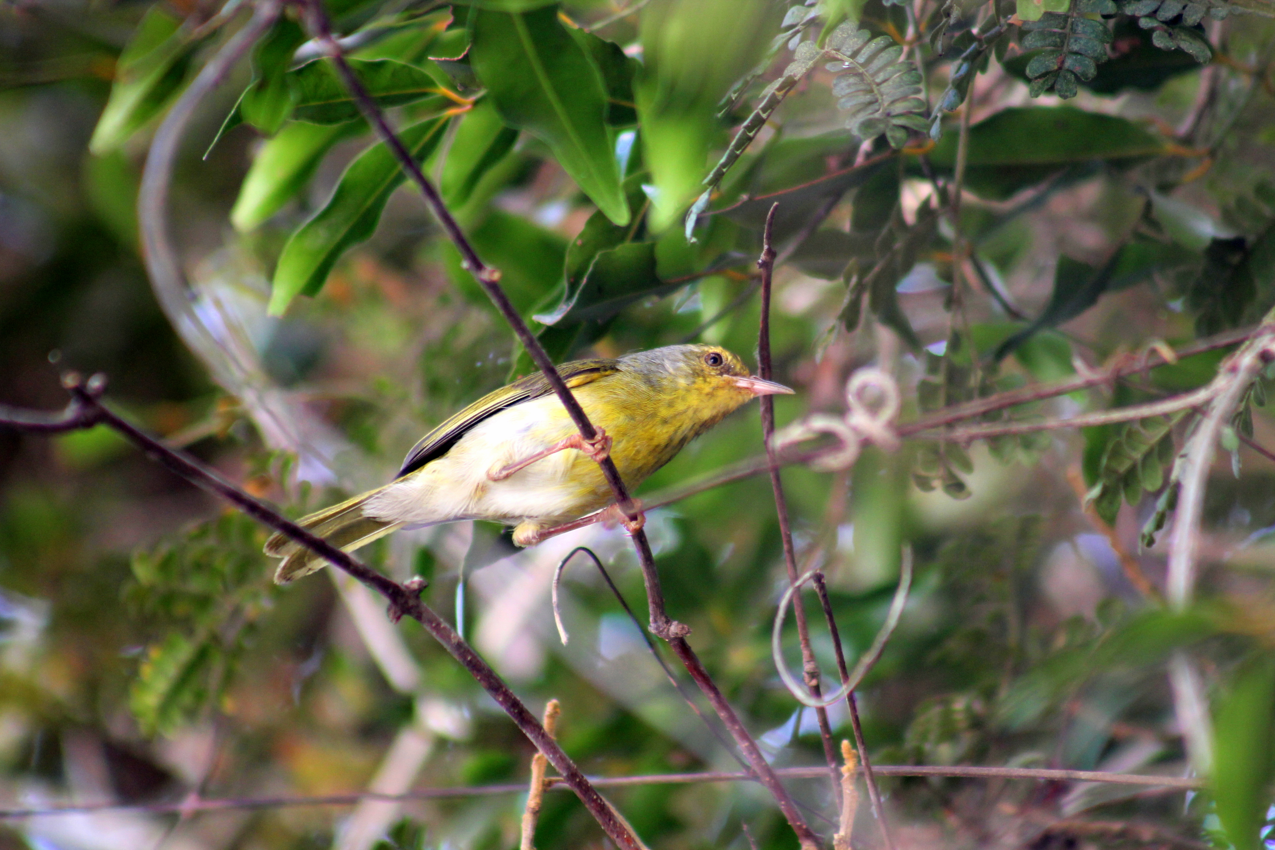 Streepkeeljery in Kirindy